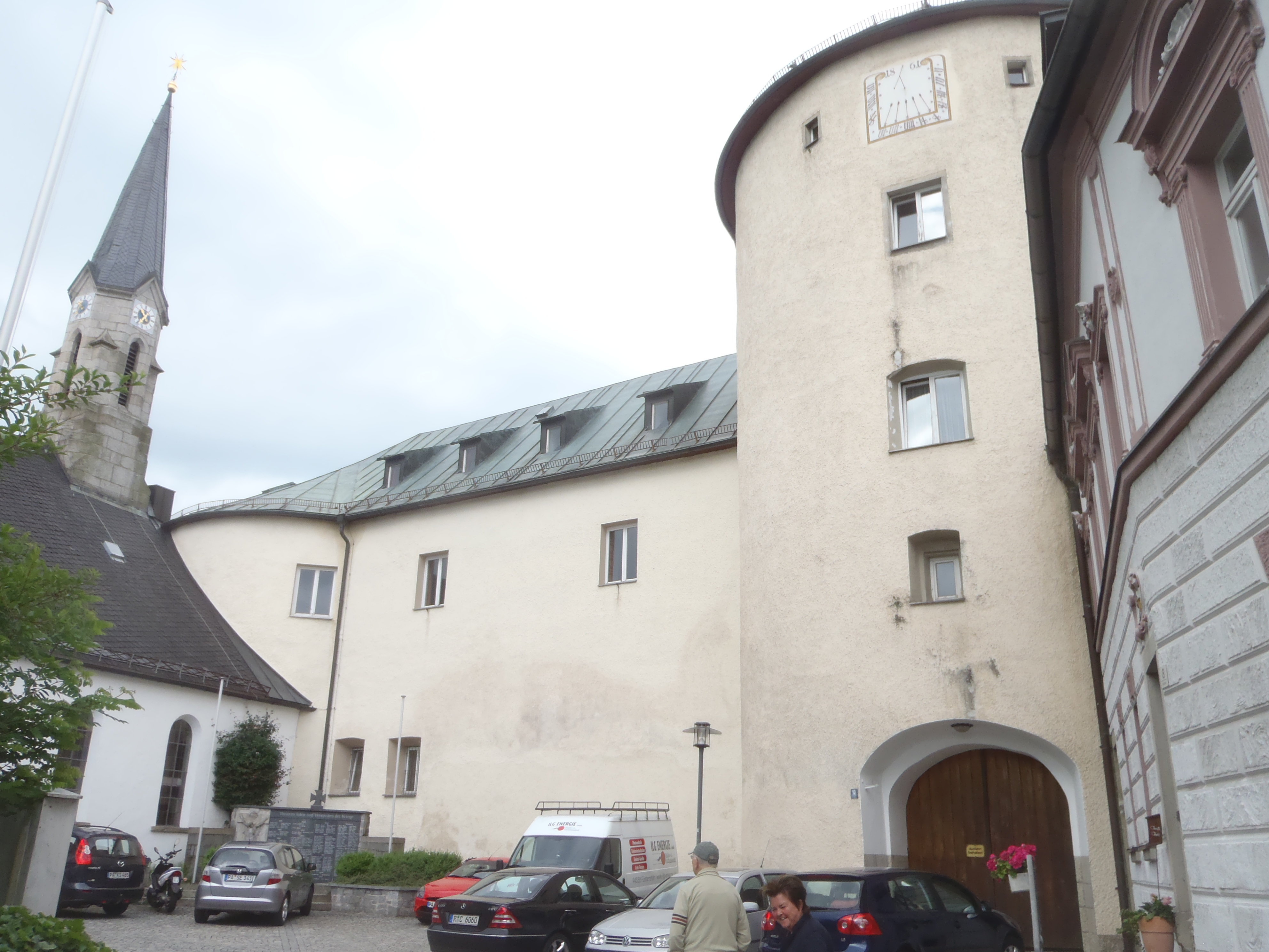 Das Schloss erhebt sich weithin sichtbar auf einer Anhöhe rund 70 Meter über der Straßenkreuzung am Fuß des Ortes. Als Erbauer werden meist die Grafen von Hals vermutet. Die damalige Burg wurde demnach 1330 oder 1332 im Rahmen einer Fehde von Heinrich dem Natternberger erobert und dann von herzoglichen Pflegern verwaltet. Eine andere Überlieferung nennt die Fürstbischöfe von Bamberg als Besitzer, von denen Hetzmanstein seinen jetzigen Namen erhalten habe und bereits 1252 auf den Bayernherzog übergegangen sei.